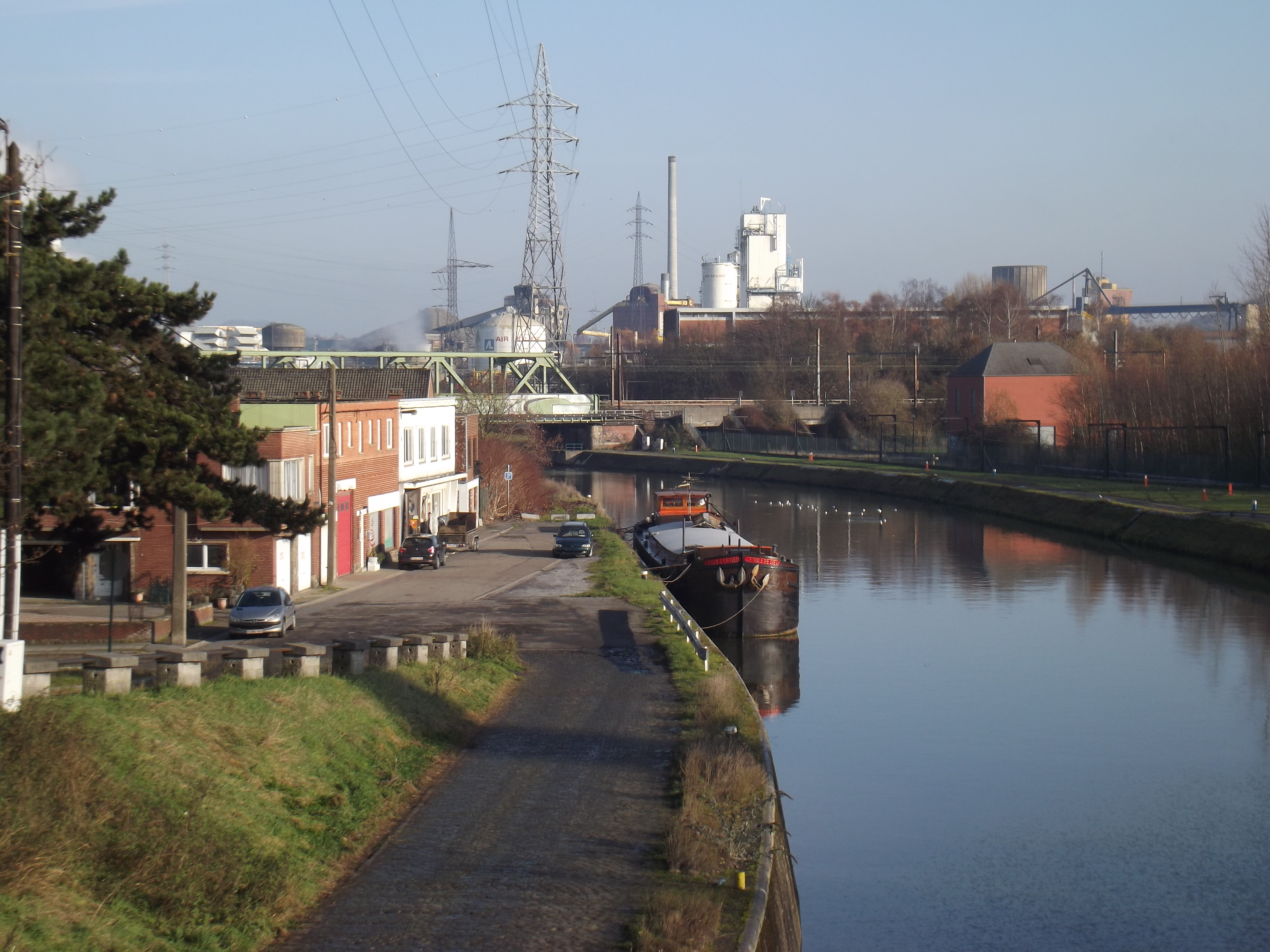 De Samber bij Marchienne-au-Pont